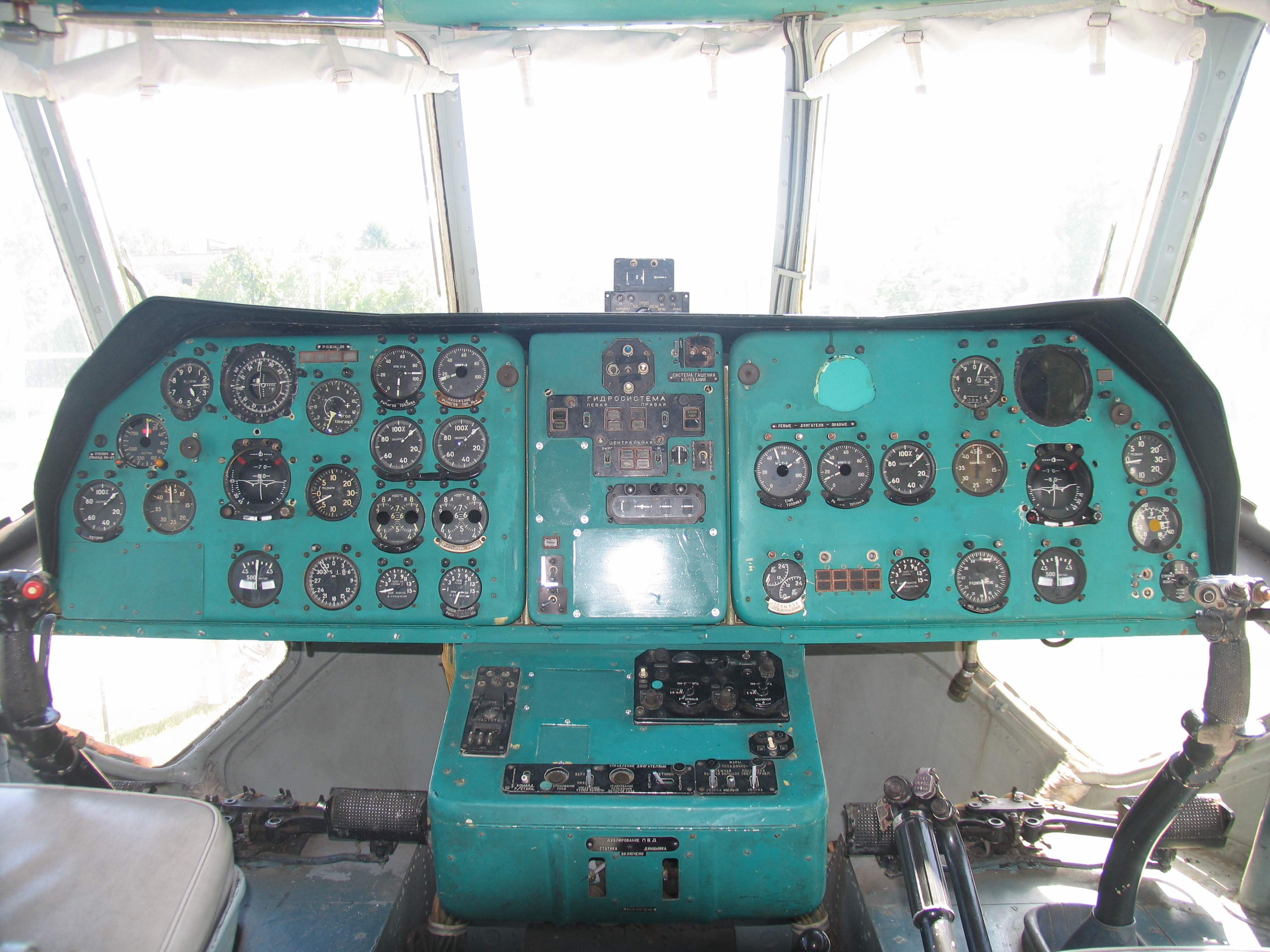 Кабина вертолёта В-12 ОКБ Миля.